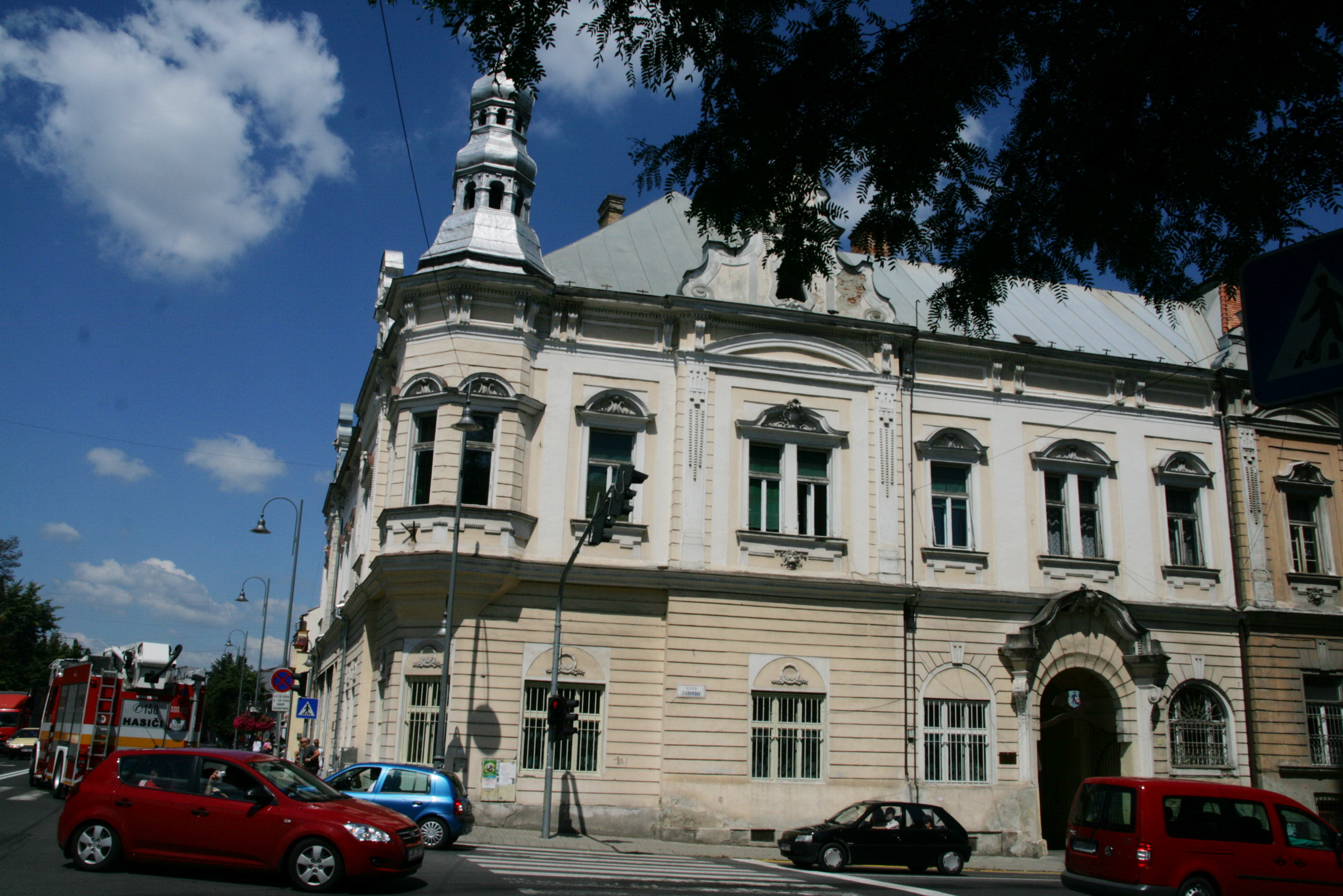 Losonc - a Kármán József utca és a T.G. Masaryk utca sarka This medium shows the protected monument with the number 606-3489/0 in the Slovak Republic.